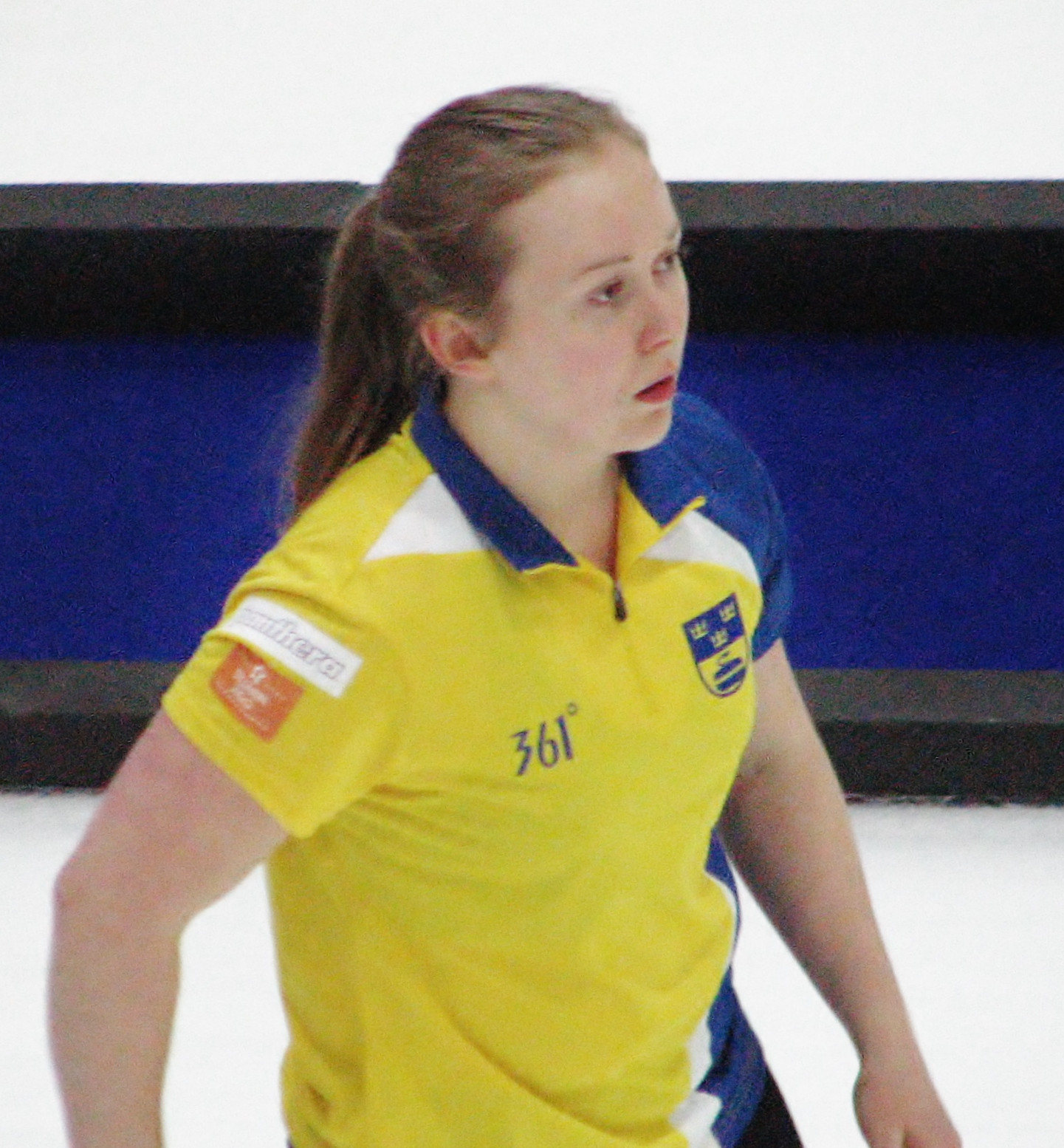 Jennie Wåhlin Rootsi naiskonnas 2015. aasta juunioride curlingu maailmameistrivõistlustel Tondi jäähallis